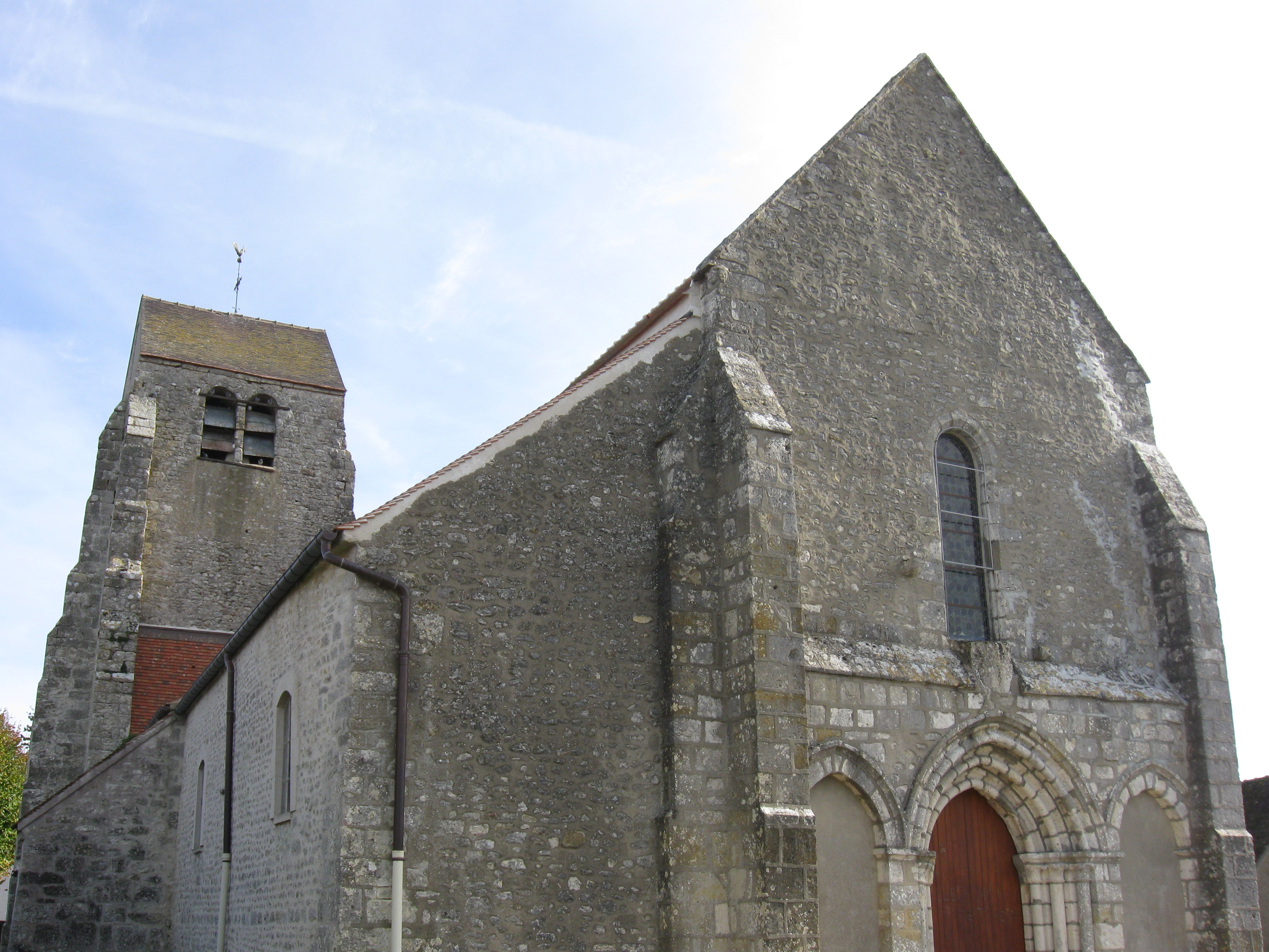 Église de Coudray. (Loiret, région Centre-Val de Loire).